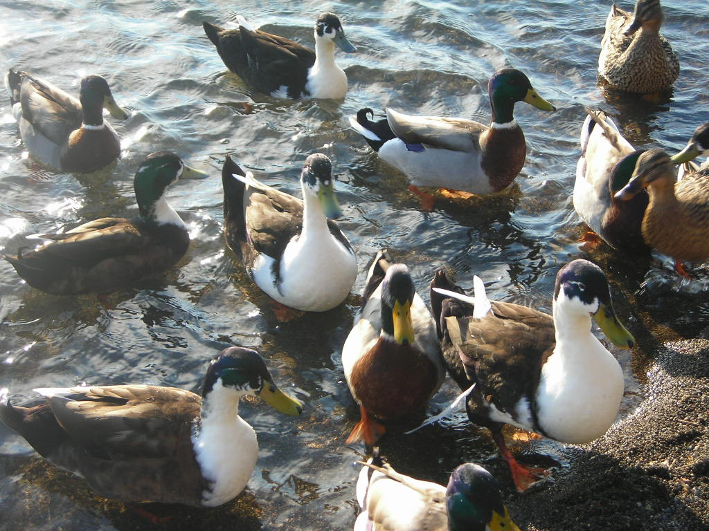 Anatre sul Lago di Bolsena